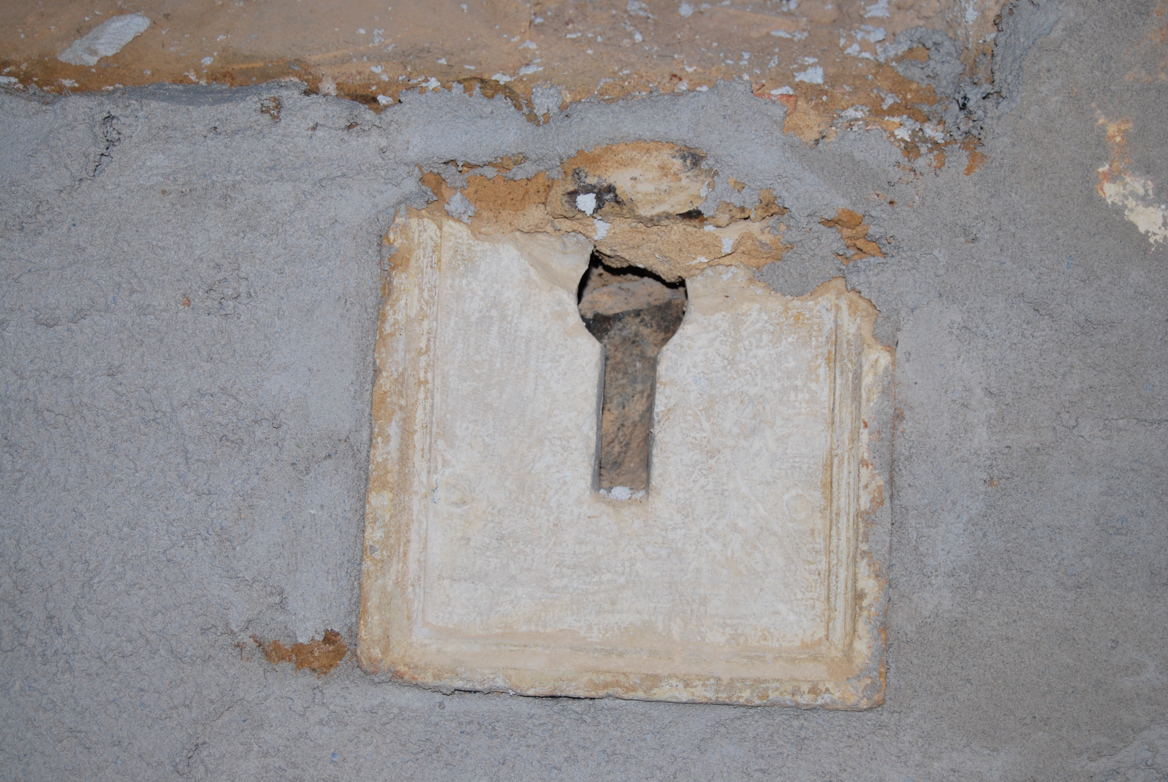 Pierre énigmatique trouvée pendant les travaux de rénovation de l'église de Saint-Georges-du-Bois dans le département français de la Sarthe, en octobre 2009.